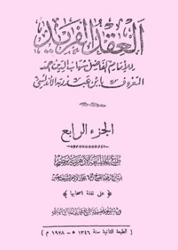 غلاف الجزء الرابع من كتاب العقد الفريد لابن عبد ربه الأندلسي (ت. ٣٢٨ هـ) - المطبعة الأزهرية بالقاهرة - الطبعة الثانية سنة ١٣٤٦ هـ / ١٩٢٨ م